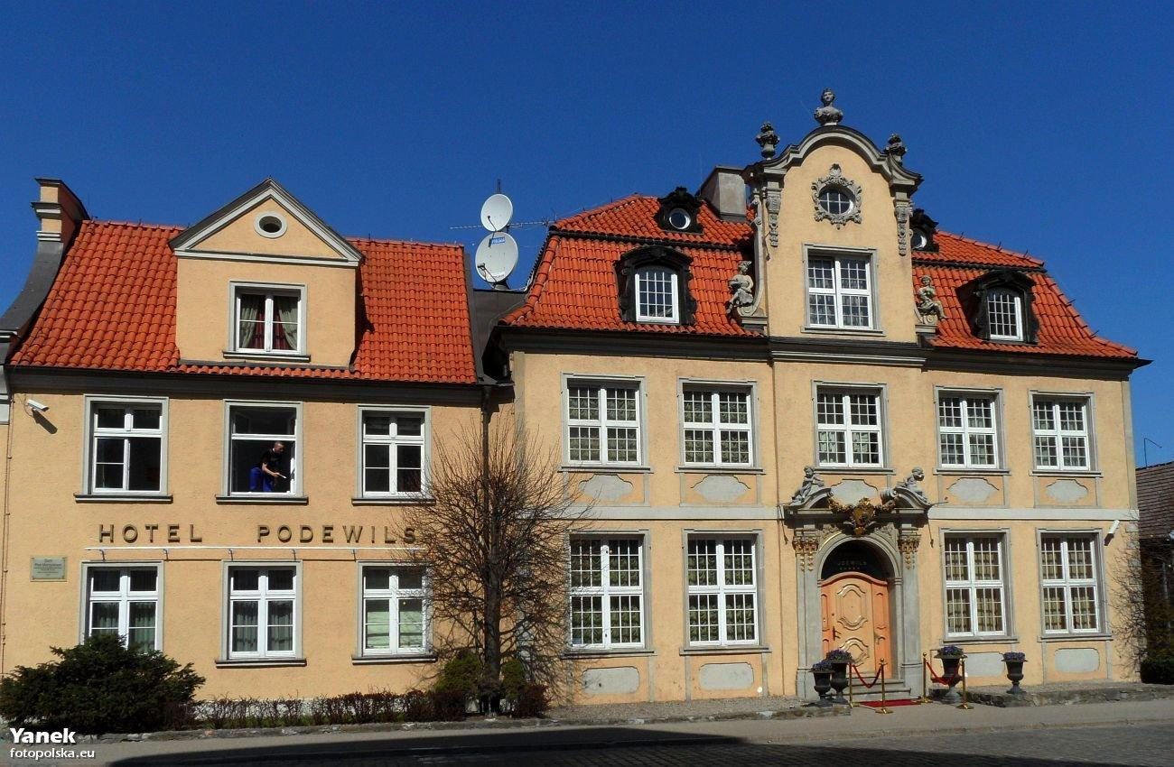 Gdańsk Długie Ogrody, ul. Szafarnia 2/3 - "Dom Pod Murzynkiem" (z prawej strony), obecnie "Hotel Podewils" (* * * * *), 1728-1735